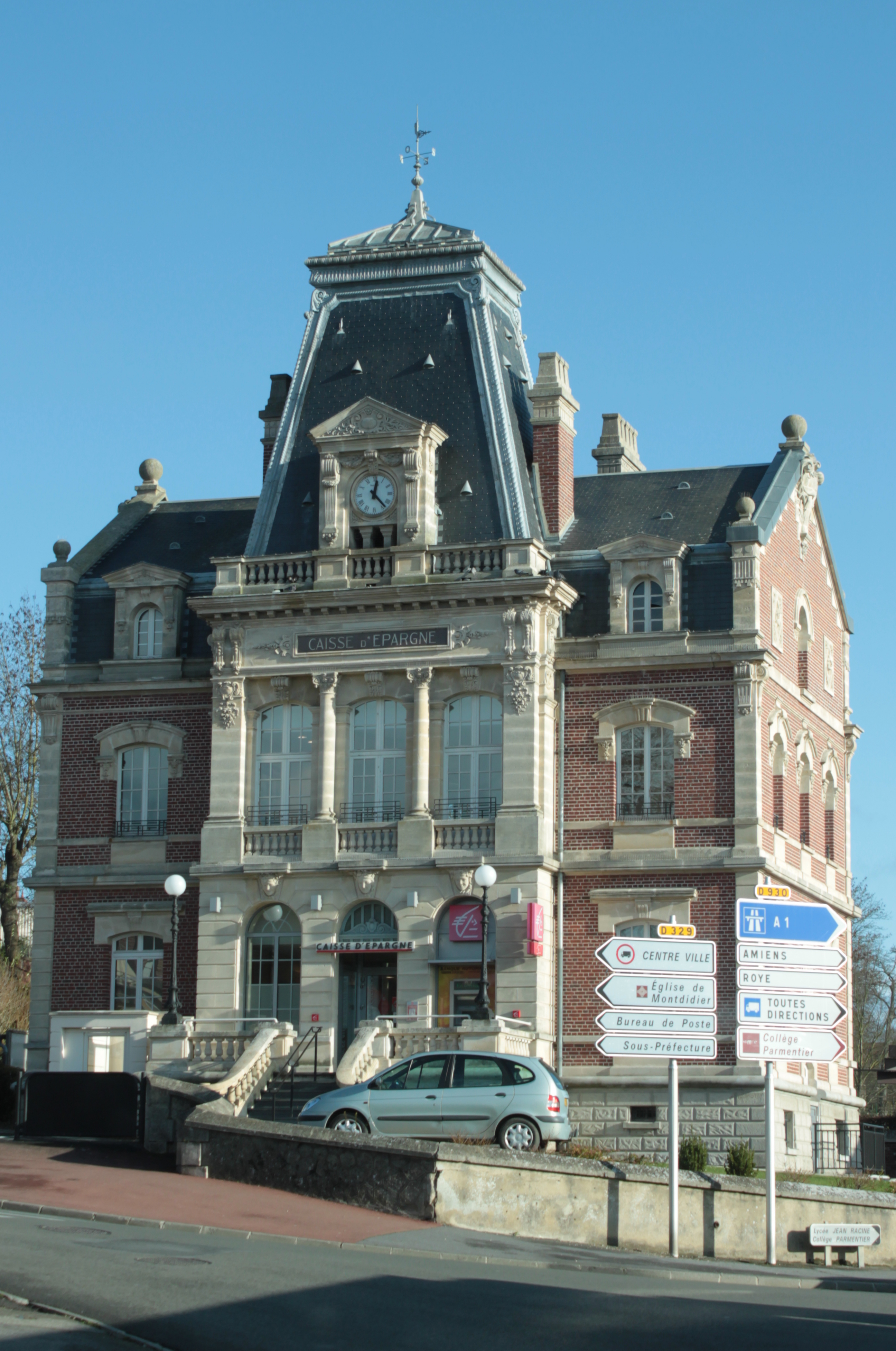 Caisse d'Épargne, Fr-80-Montdidier.